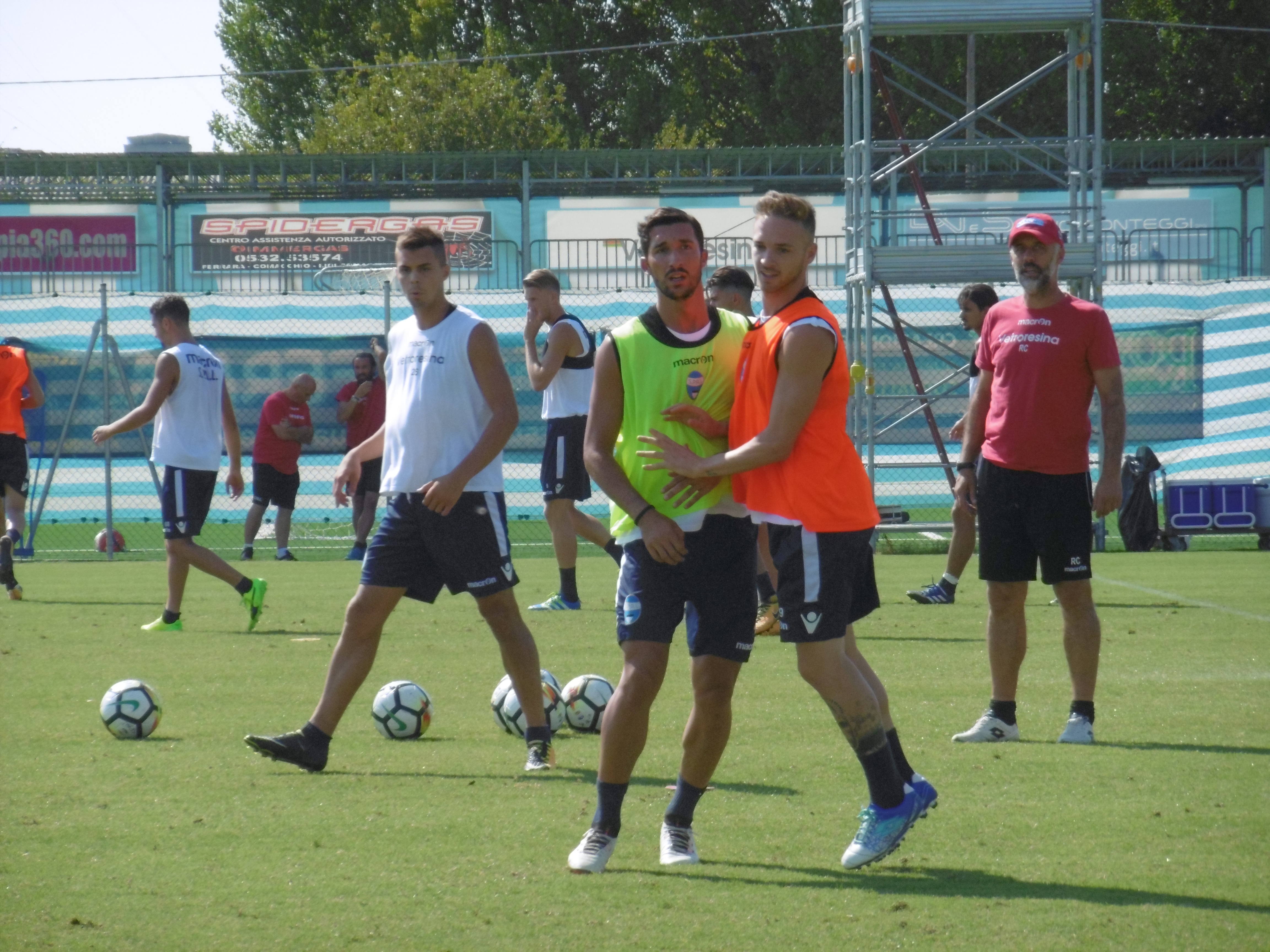 Alessandro Bellemo e Manuel Lazzari, giocatori della Spal